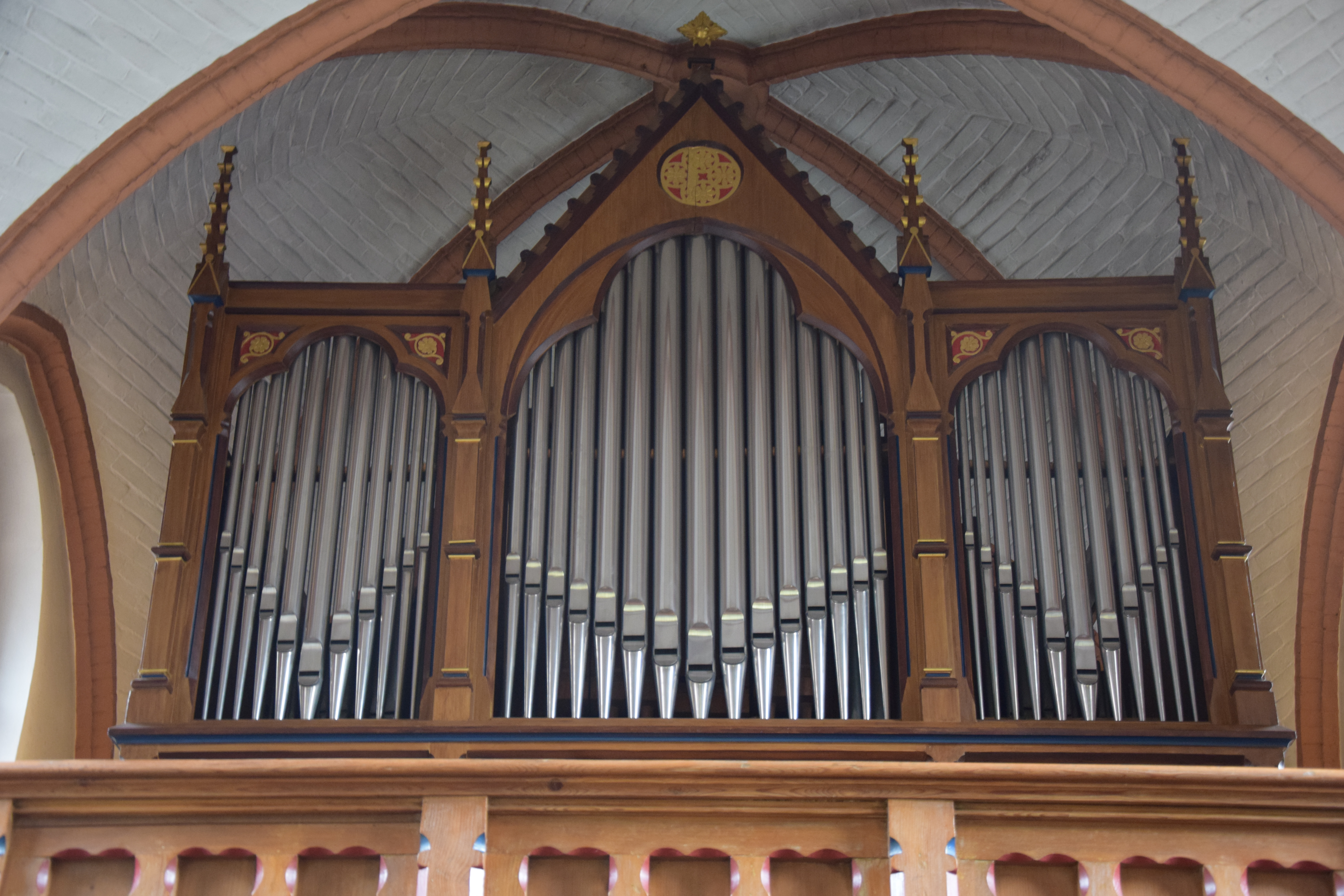 Prospekt der Krell-Orgel der Gustav-Adolf-Kirche Gieboldehausen